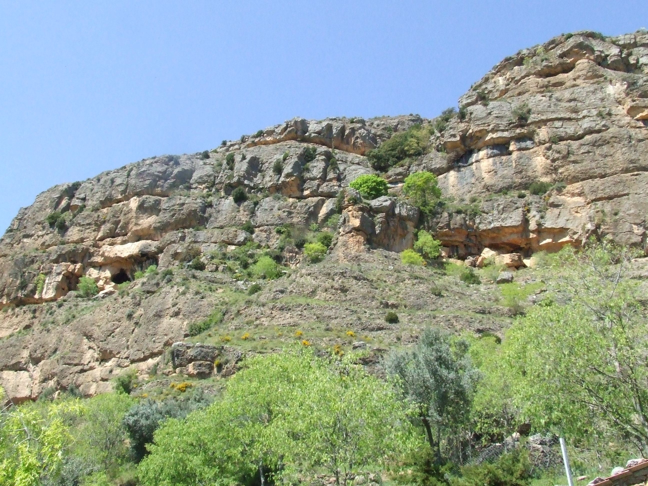 Els Corrals de Gurp (Gurp de la Conca, Tremp, Pallars Jussà)